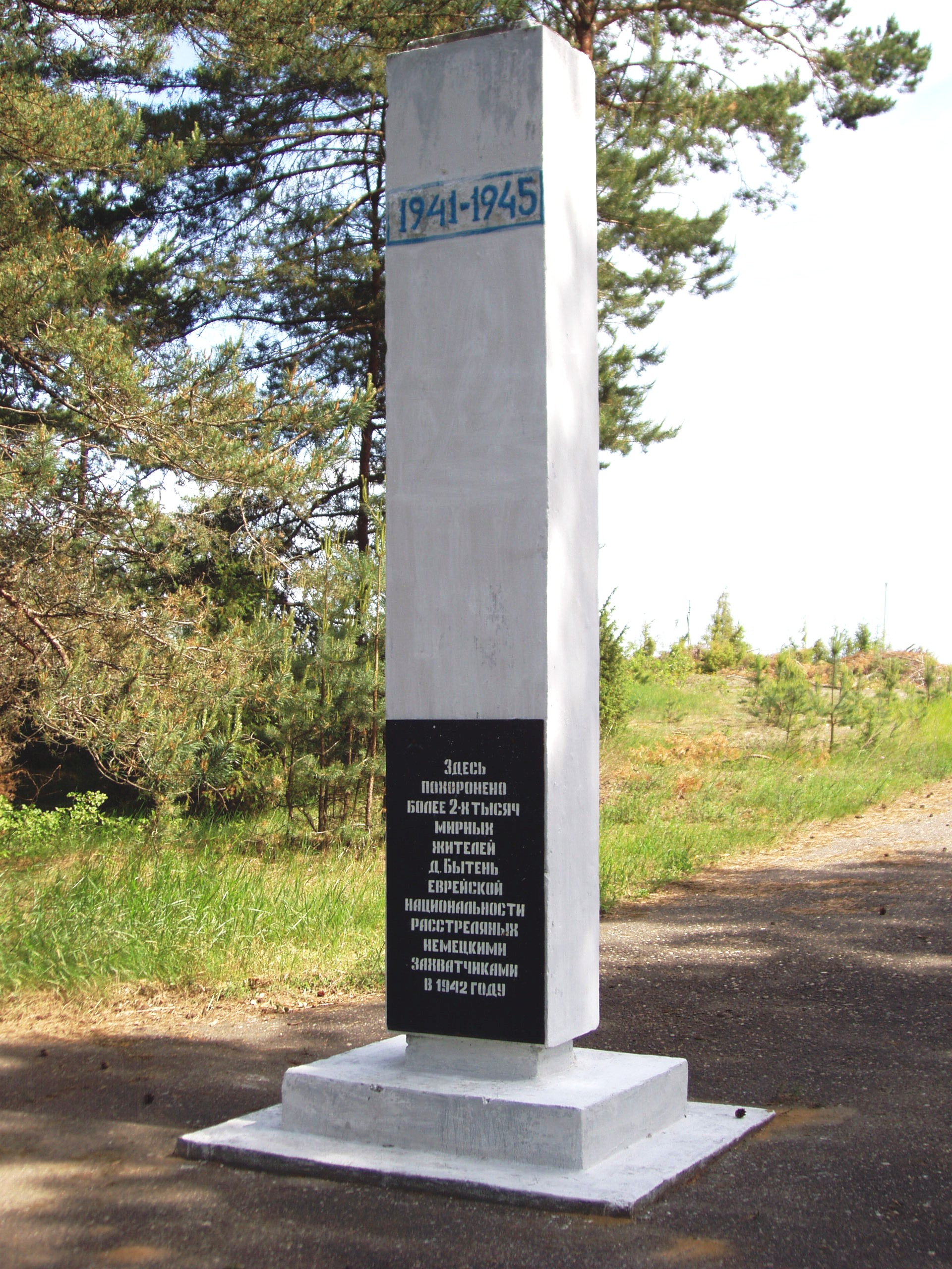 Памятник на месте убийства 2000 евреев нацистами в Бытене в 1942 году.